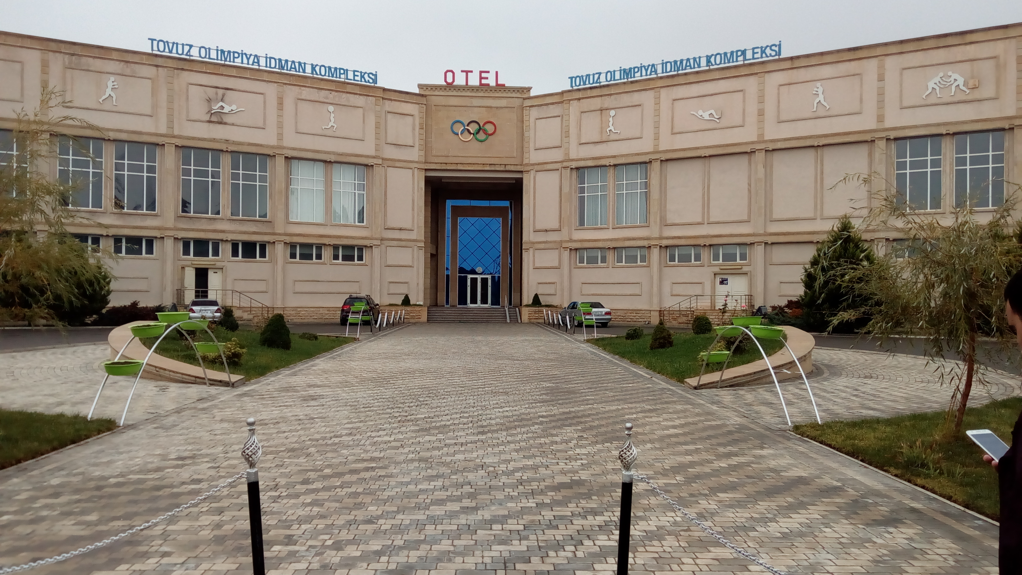 Tovuz OİK